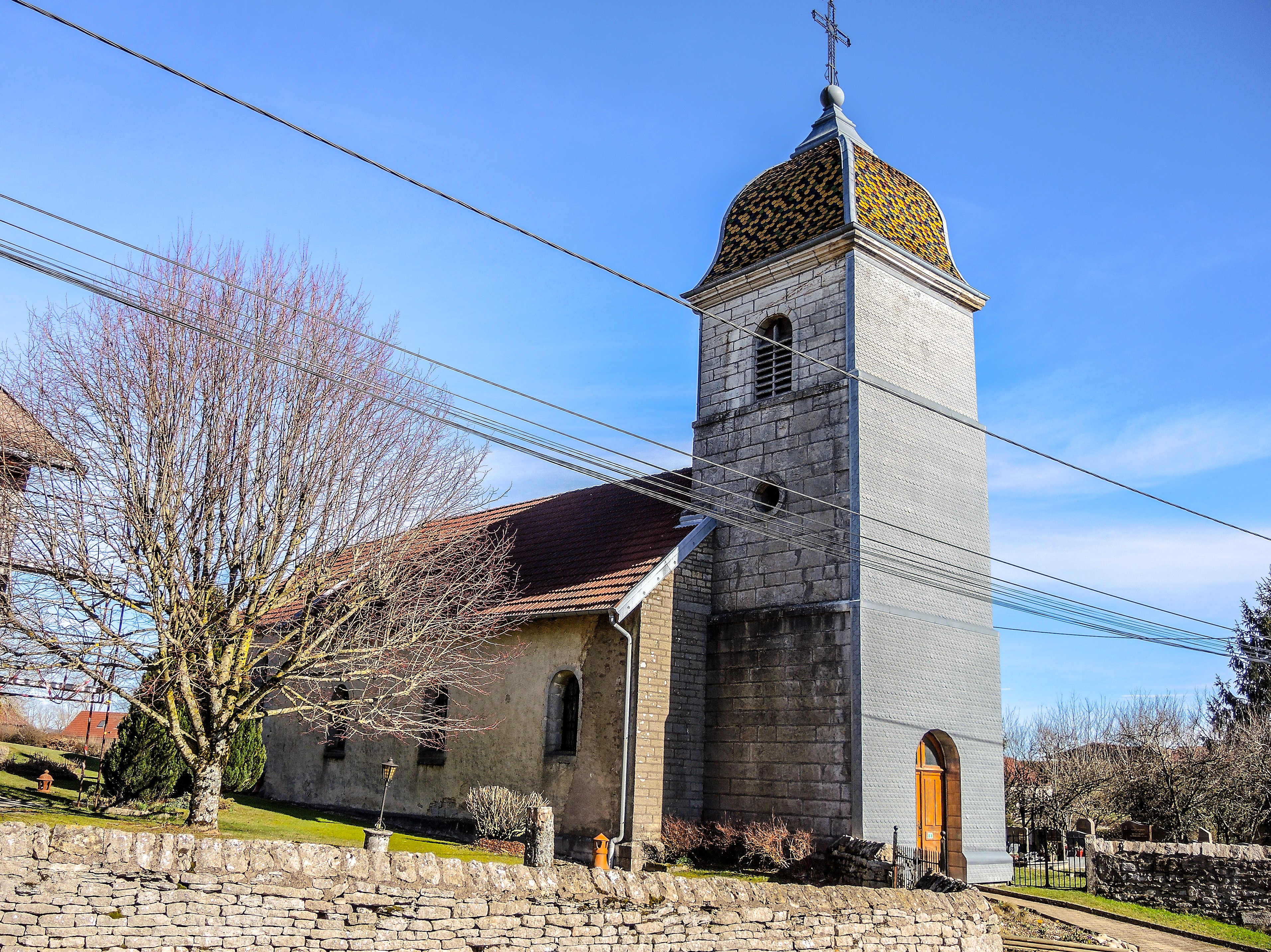 Eglise Saint Claude d'Epenouse. Doubs